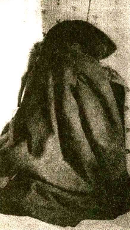 Тело убитого Георгия Гапона под шубой на даче Звержинской в Озерках